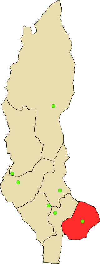 Provincia de Rodríguez de Mendoza en departamento Amazonas